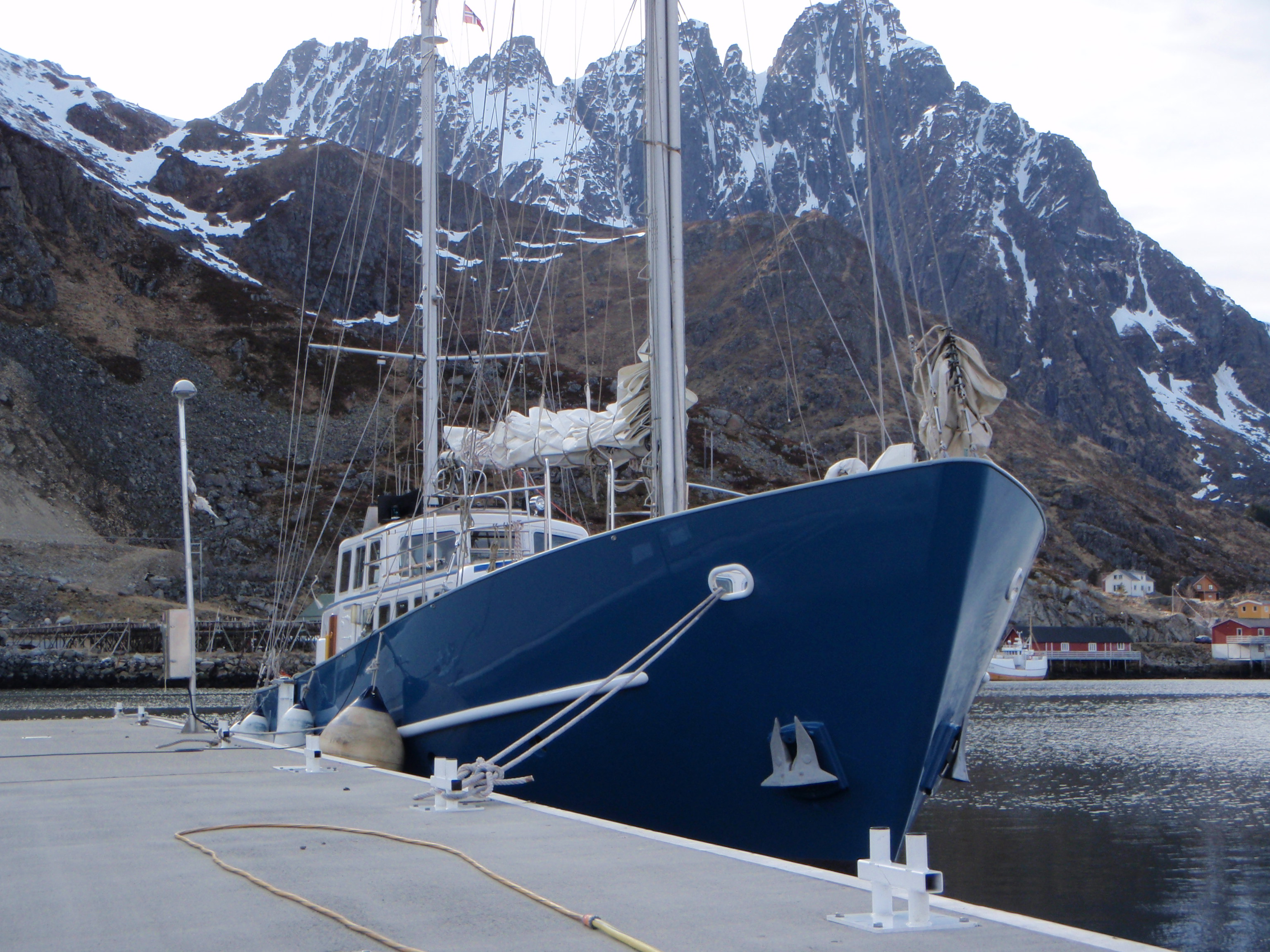 Aztec Lady aux ïles Lofoten Norvège